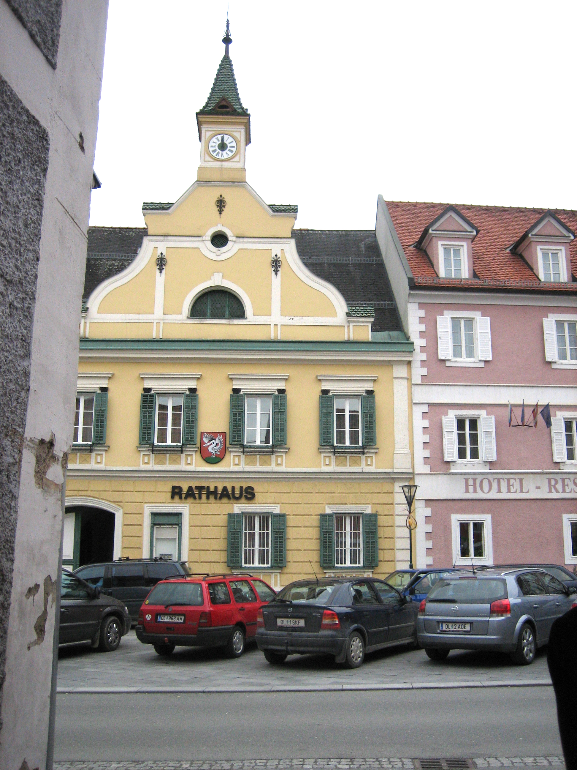 Rathaus, Gemeindeamt